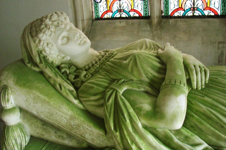 Luiza Vecseghy, portret nagrobny z kaplicy w Feistritz am Wechsel